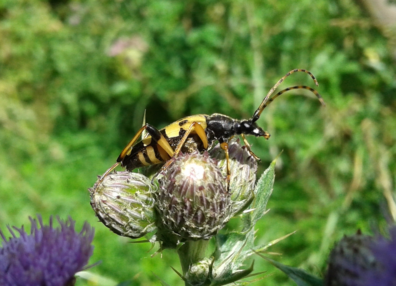 Rutpela maculata, vu sur son abdomen jaune et noir lieu 59210 année 2017